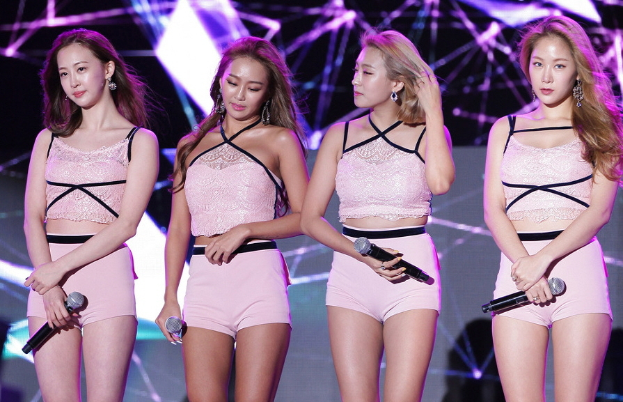 씨스타(SISTAR) G페스티벌 아시아 드림 콘서트